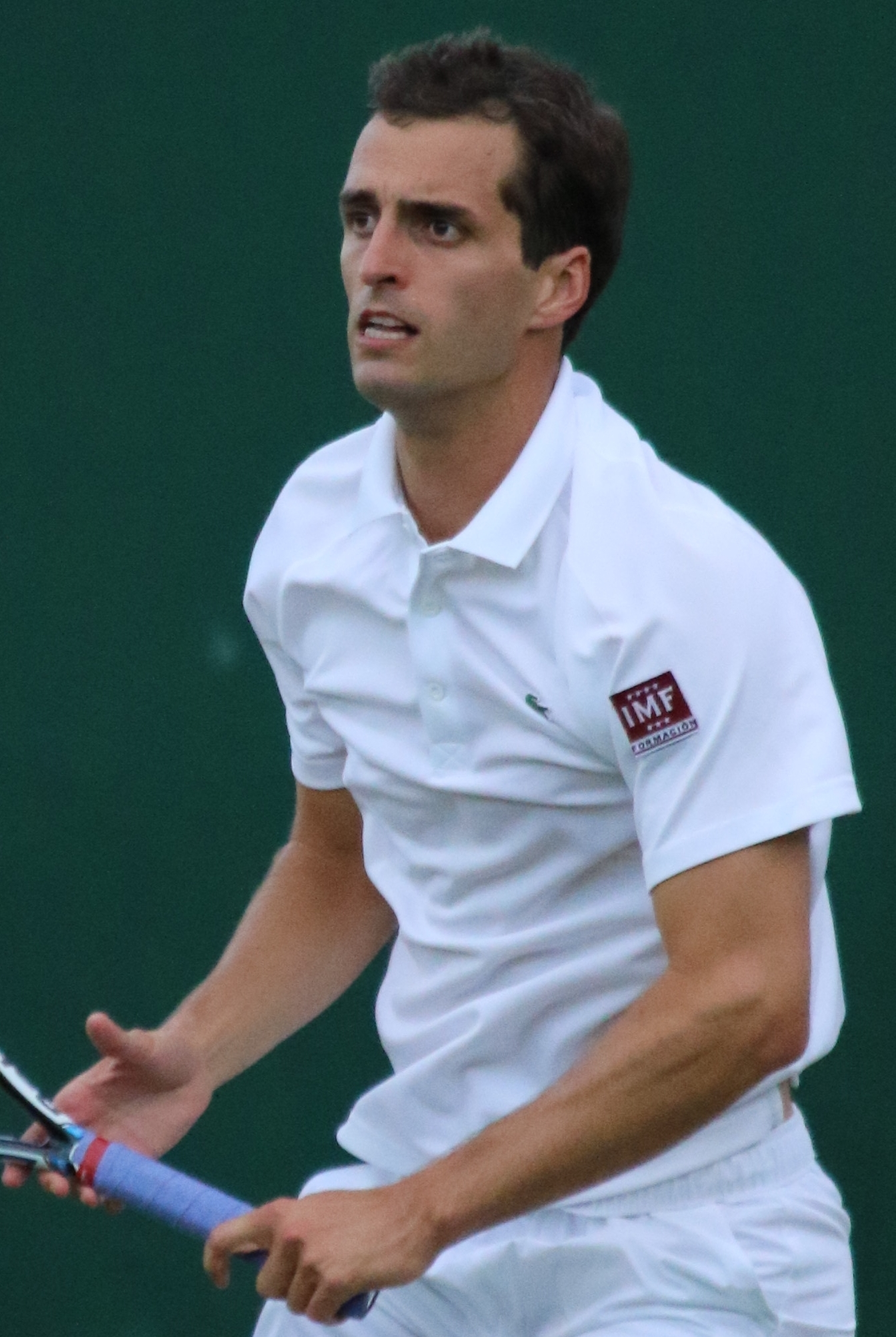 Ramos Vinolas WM16 (15)